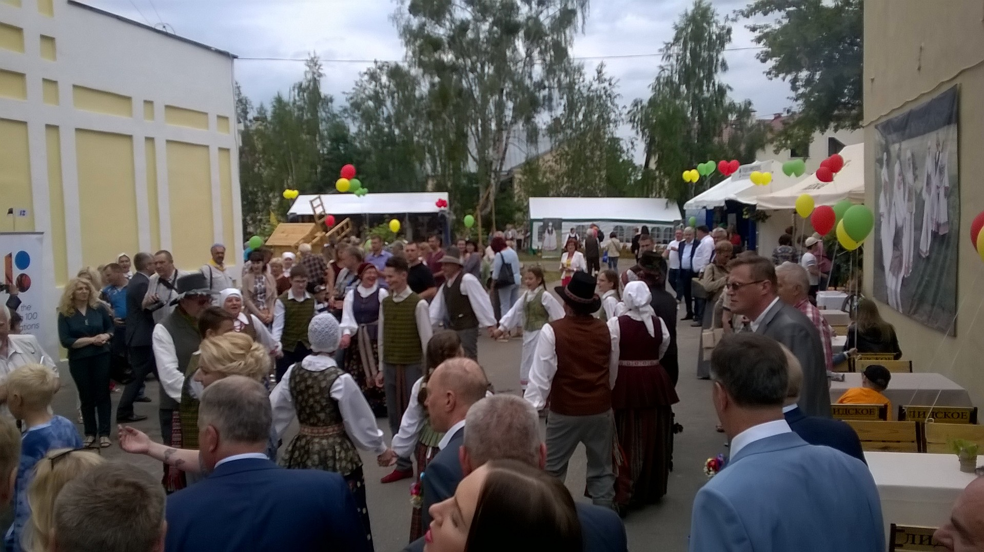 Літоўска-латышска-эстонскі падворак падчас ХII Рэспубліканскага фестывалю нацыянальных культур у Гродна 2 чэрвеня 2018 года.